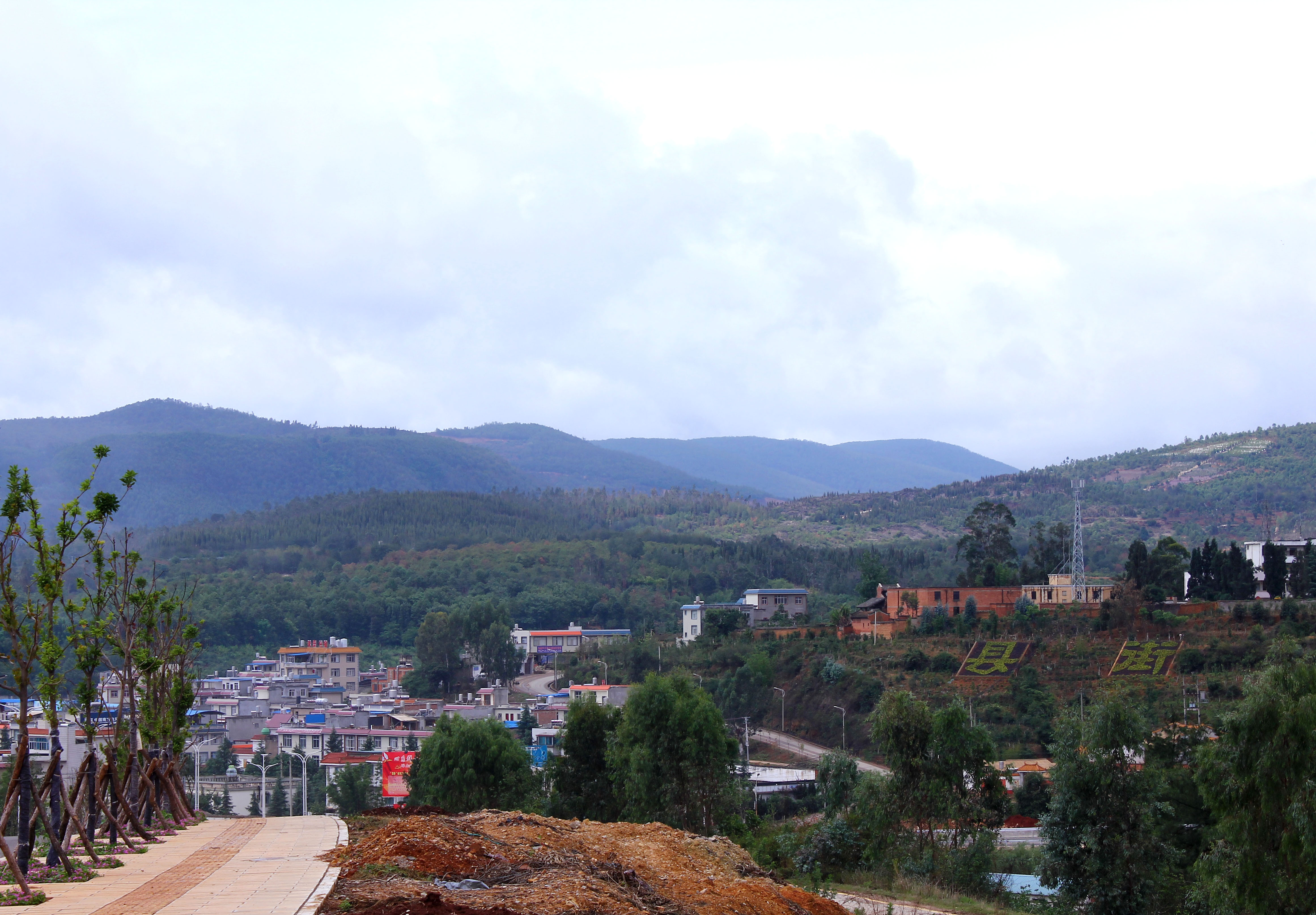 云南省安宁市县街街道（原县街镇）